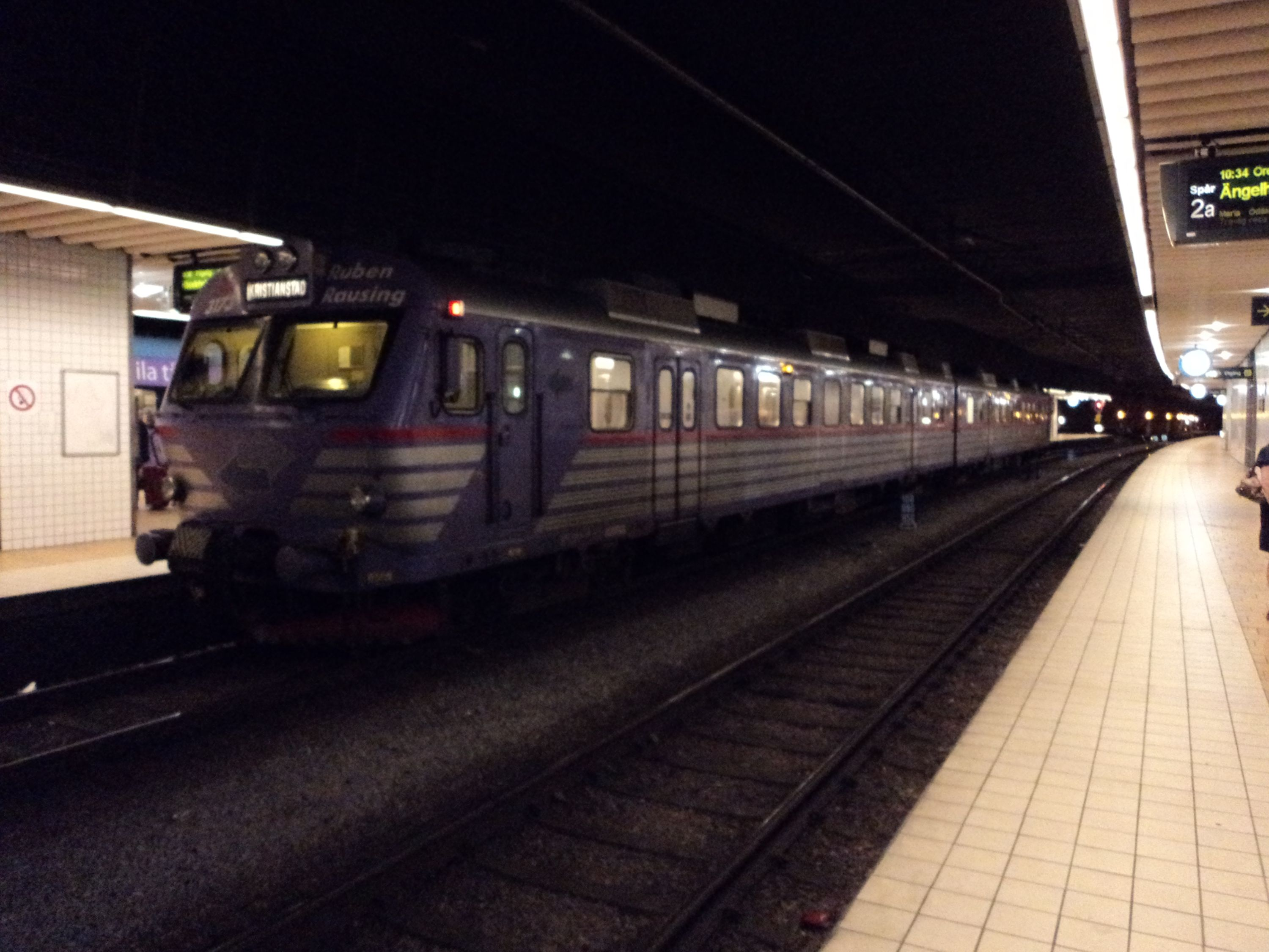 Pågatåg nr. 3173 (Ruben Rausing) inväntar avgång mot Kristianstad på Helsingborg centalstation (Knutpunkten).